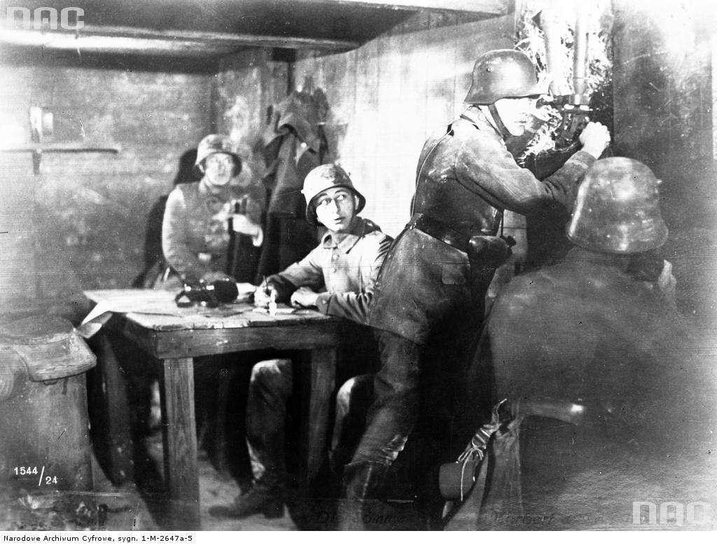 Żołnierze niemieccy ze stacji obserwacyjnej artylerii niemieckiej podczas I wojny światowej. UWAGA: To nie jest scena z brytyjskiego filmu „The Battle of the Somme” jak to wynika z opisu Narodowego Archiwum Cyfrowego.